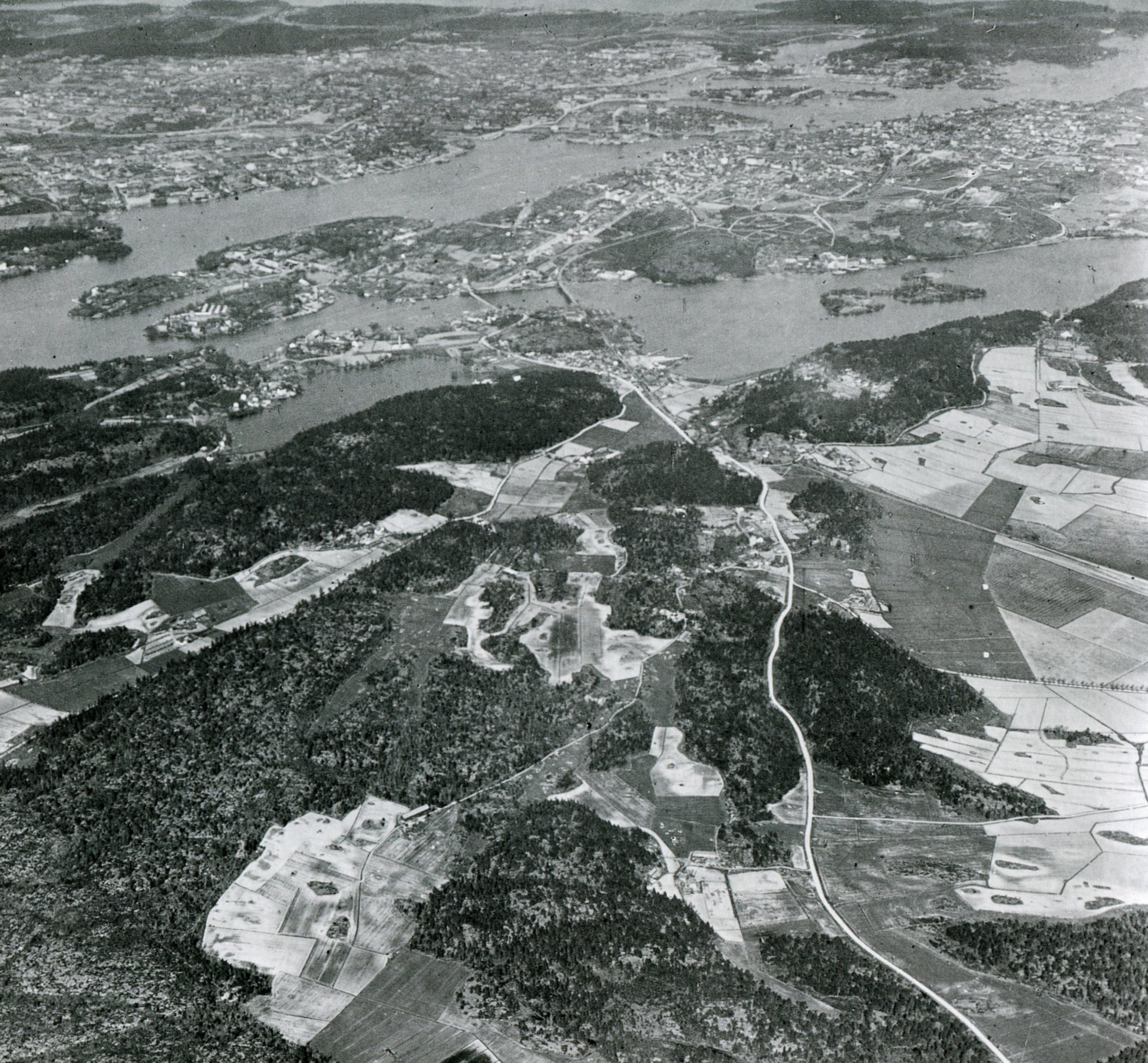 Stockholm från sydvöst. Den vita linjen är Södertäljevägen. Det ljusa område i föregrunden är utdikningen av Västertorp. Ballongfoto av Oscar Halldin 1898.